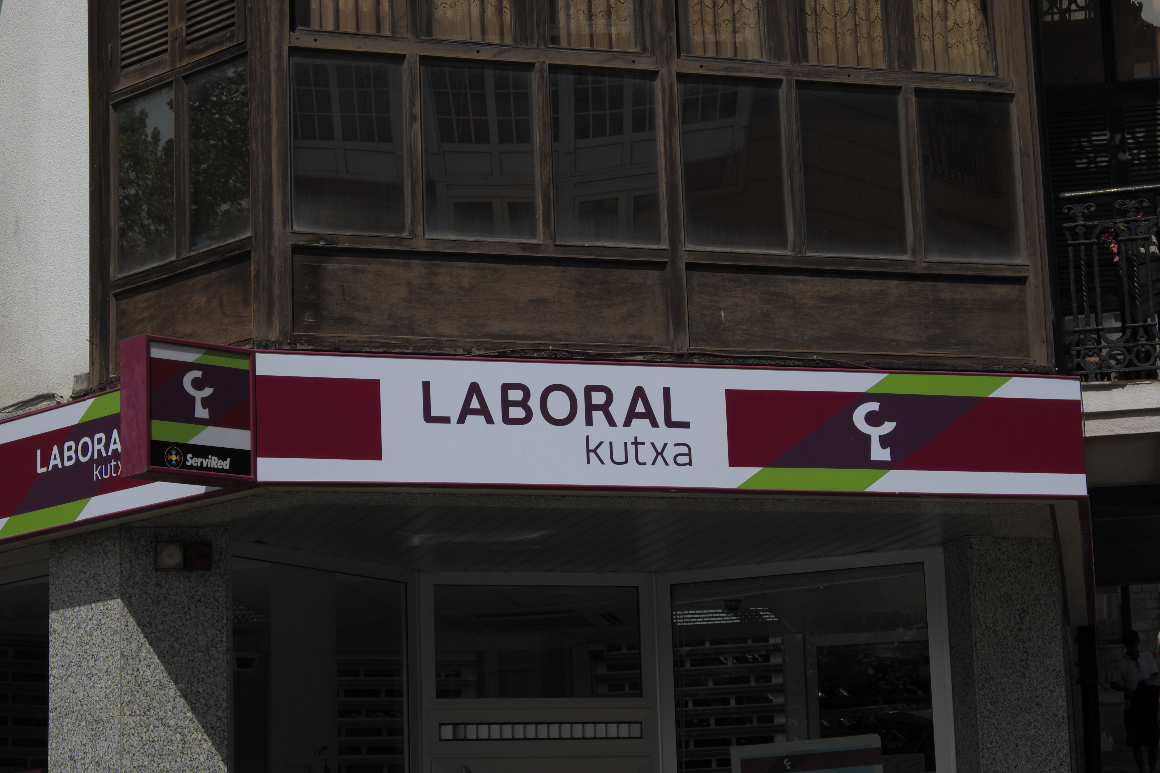 Gebäude der Caja Laboral in Zumaia in der Provinz Gipuzkoa (País Vasco/Spanien)